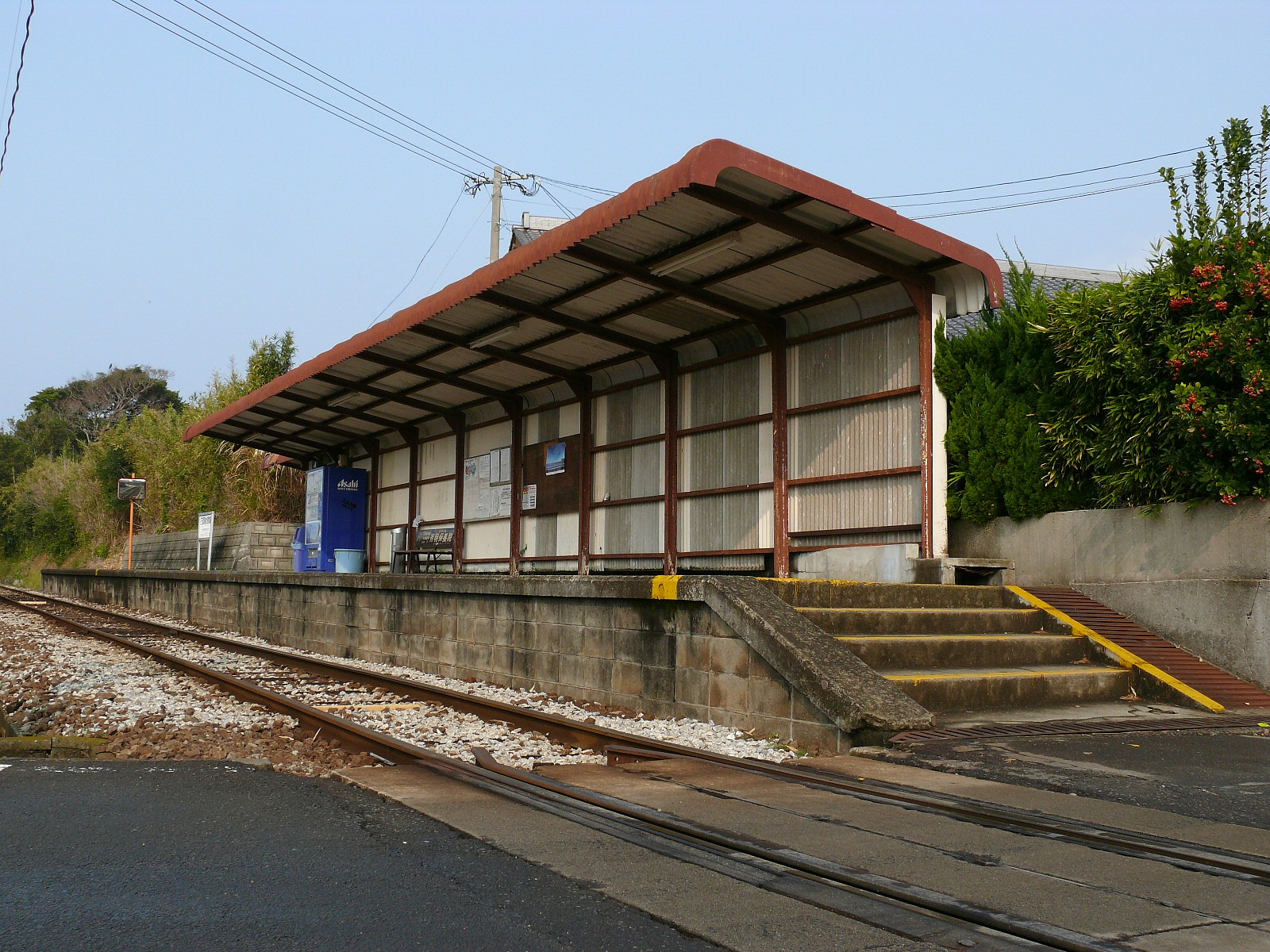 Shimabara-Railway Shimabara-Railway-line Shirahamakaisuiyokujomae-station (Japan, Nagasaki,Minamishimabara-City). 島原鉄道島原鉄道線の白浜海水浴場前駅のホーム。駅の所在地は長崎県南島原市口之津町。